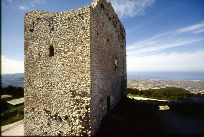 Torre saracena sul Monte Bonifato, Alcamo